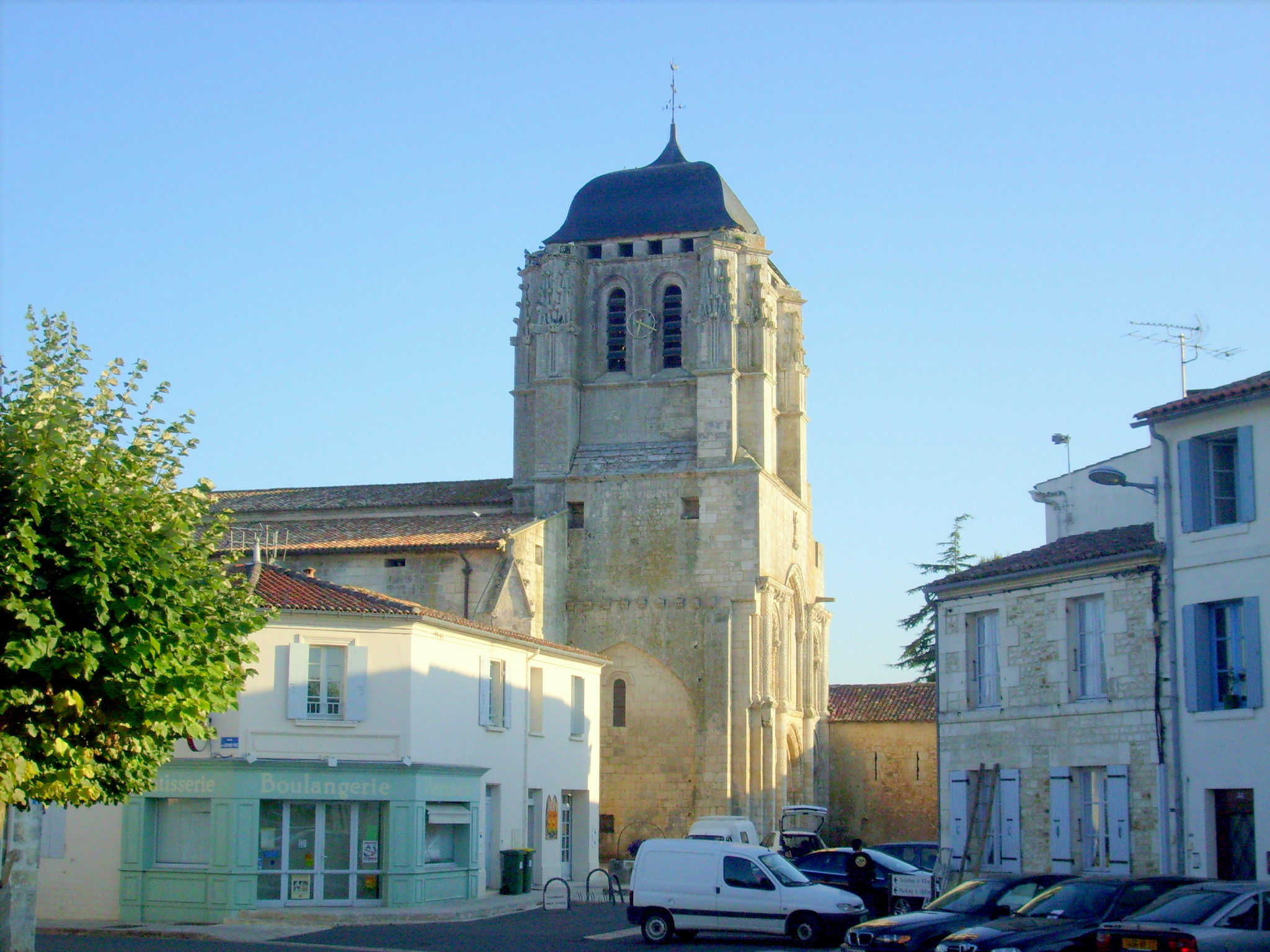 Le centre-bourg de Corme-Royal